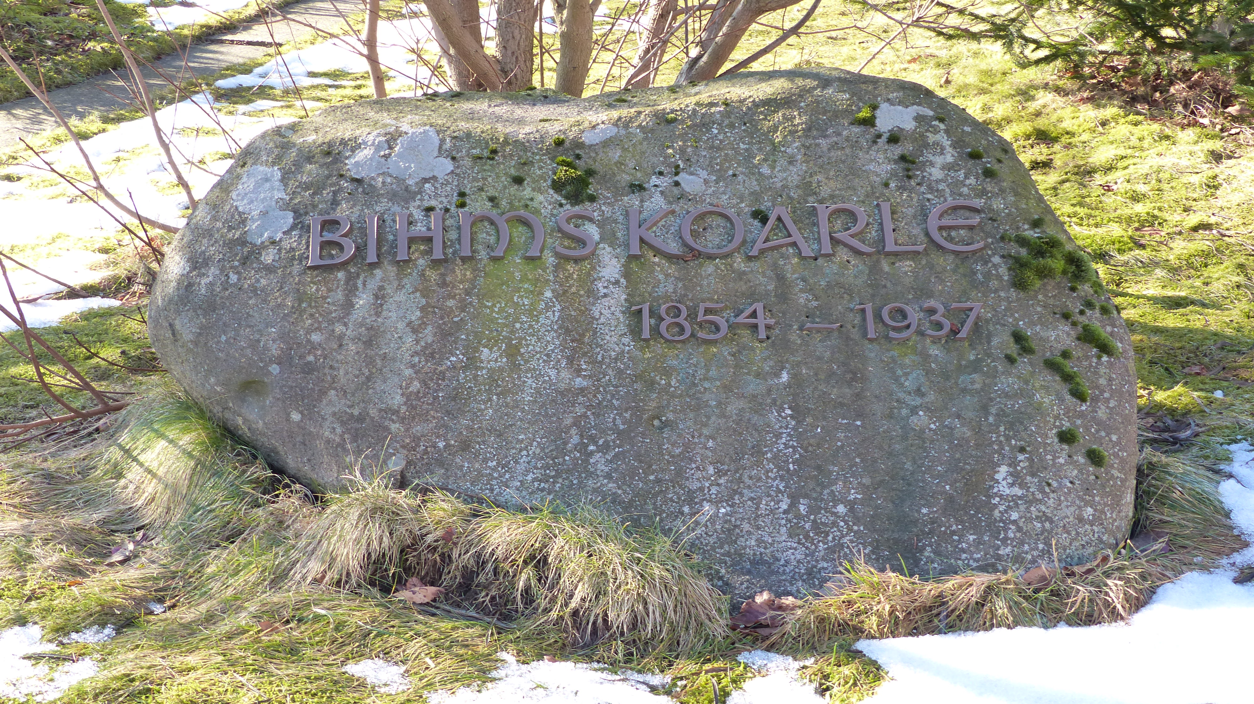 Gedenkstein für Bihms Koarle (August Matthes) vor seinem Geburtshaus, Dresdener Straße 51 in Wehrsdorf